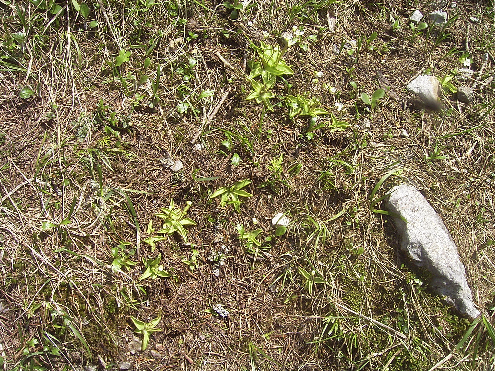 Pinguicula alpina at Rax, Austria